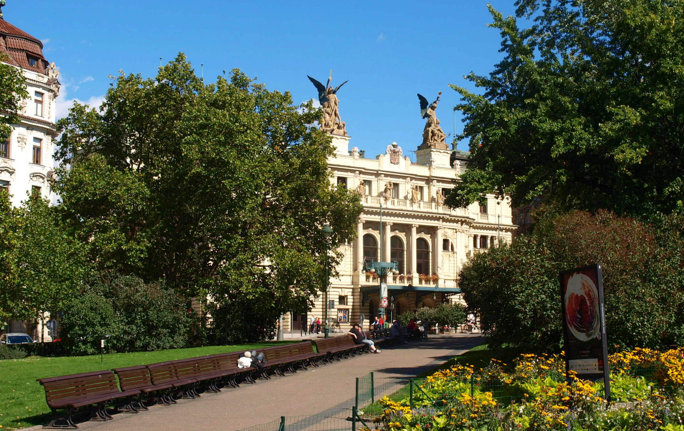 Náměstí Míru